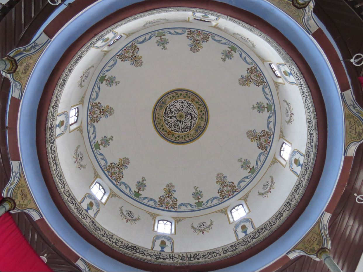 Kütahya Mevlevihanesi kubbesi